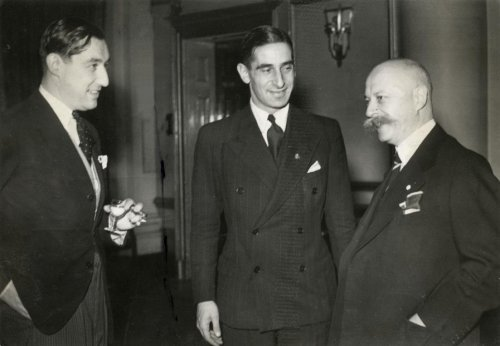 Voorzitters van beide landen bij de voetbalinterland Nederland-België in Londen, Groot Brittannië, 1943. Vlnr: J. Nieuwenhuis, voorzitter van de Belgische Voetbalbond in Engeland, Albert Milhado, voorzitter van de Nederlandse Sport-organisatie in Engeland en de Nederlandse premier professor Gerbrandy.